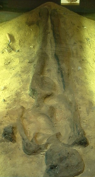 Sutton Hoo